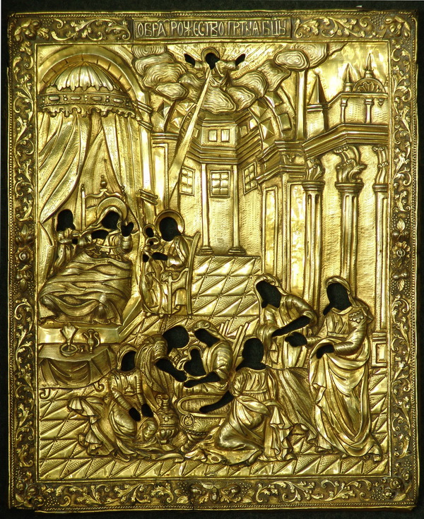 Оклад иконы «Рождество Пресвятой Богородицы». Мастер Иван Григорьев. Москва. 1750-е гг. Мастеру удалось передать глубину пространства и барочные архитектурные формы интерьера, пластику объемов и живописную игру светотени.